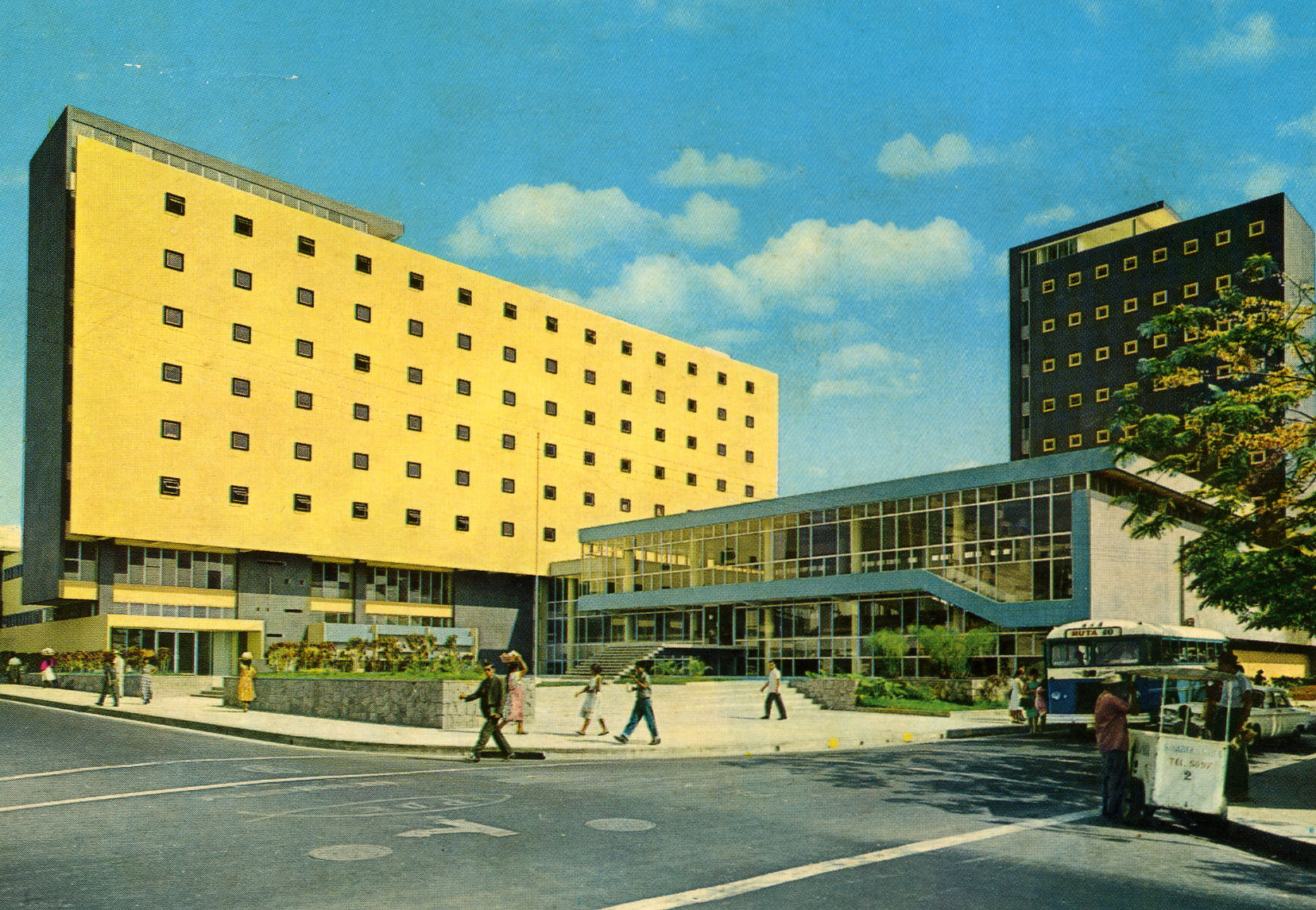 Edificio de la Biblioteca nacional y del MINED antes del terremoto